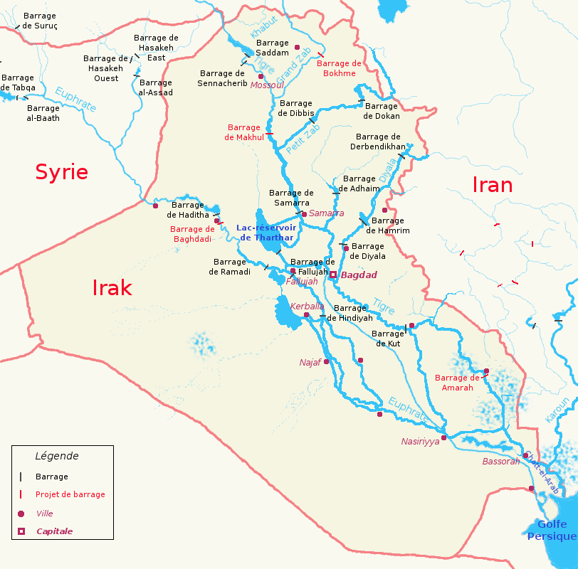 Carte des ouvrages hydrauliques irakiens réalisée avec The GIMP par X Guimard.